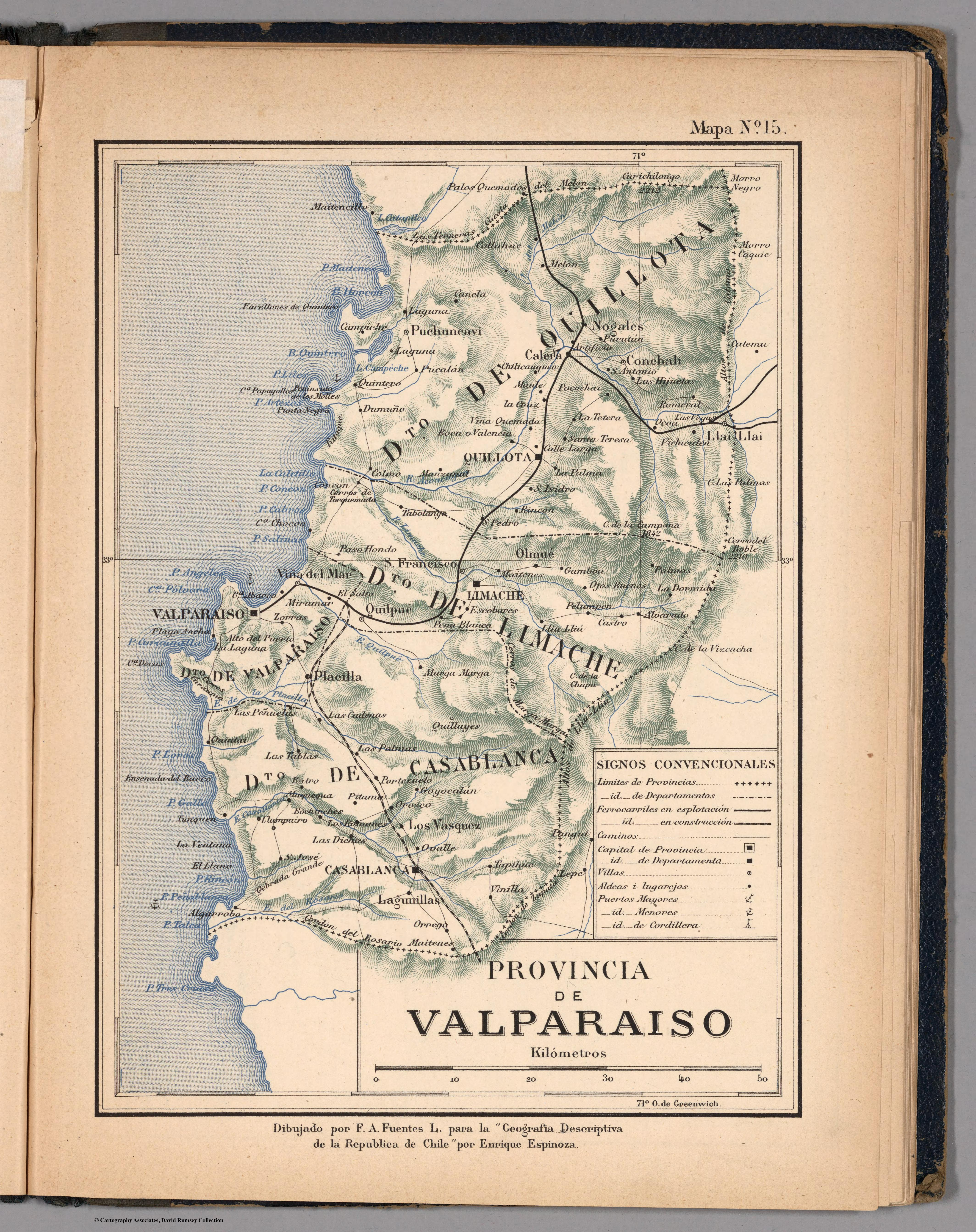 Atlas de Chile Arreglado para la Jeografia Descriptiva de la Republica de Chile por Enrique Espinoza.